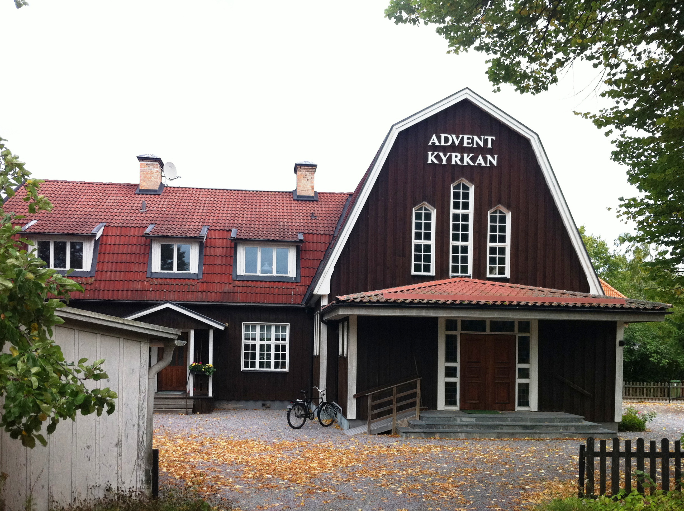 Advent kyrka Uppsala, före detta Sankt Olofs kapell